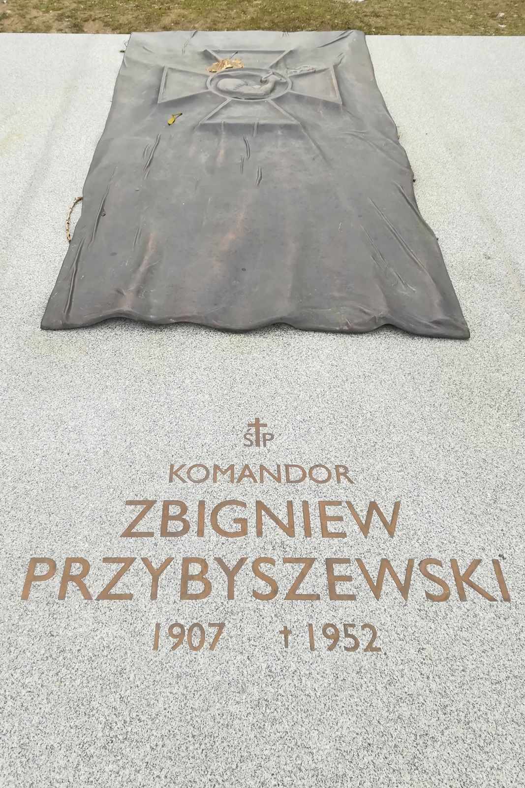 Cmentarz Marynarki Wojennej_Kwatera Pamięci_Komandor Przybyszewski_1